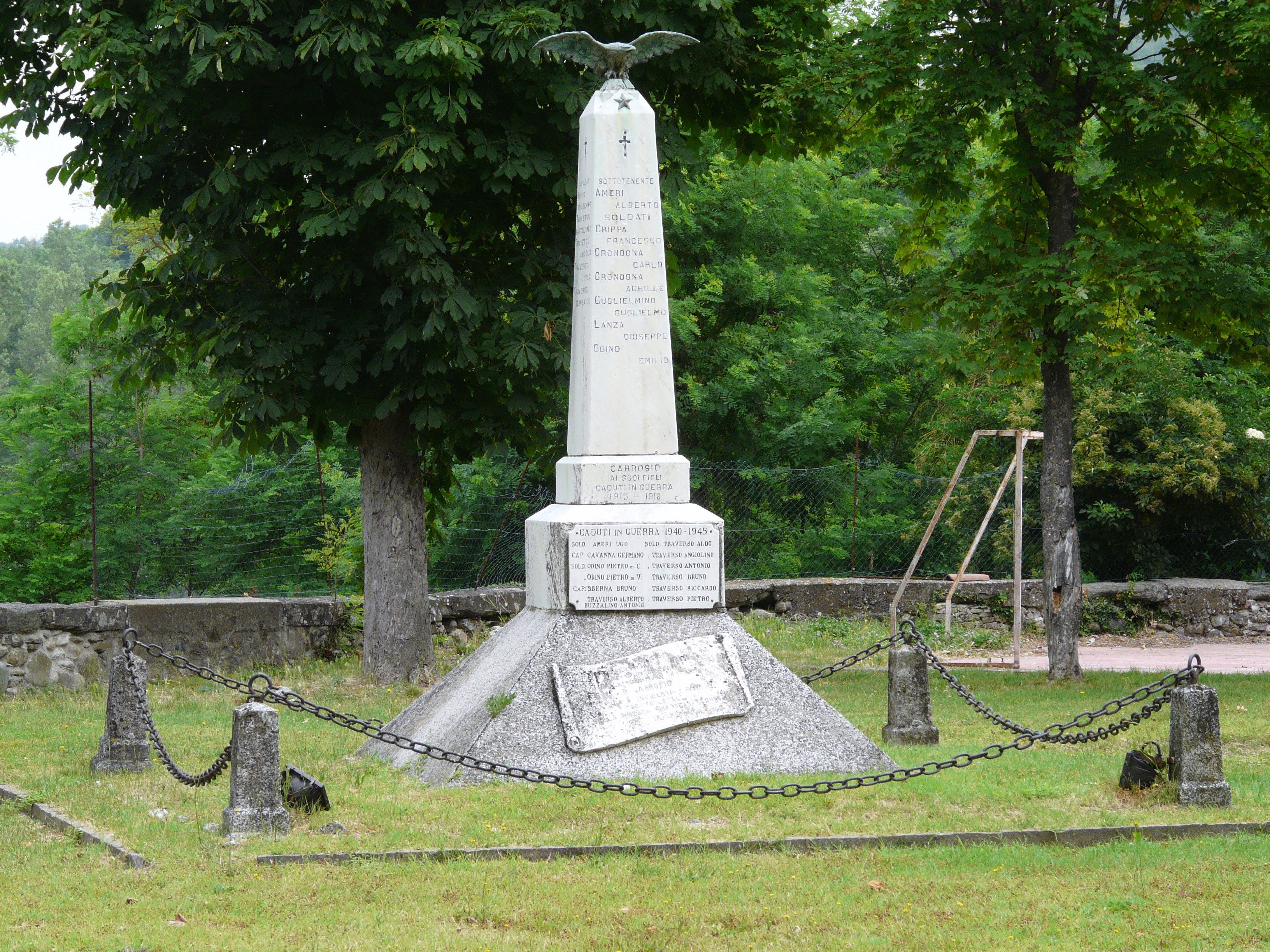 Monumento ai caduti, Carrosio, Piemonte, Italia